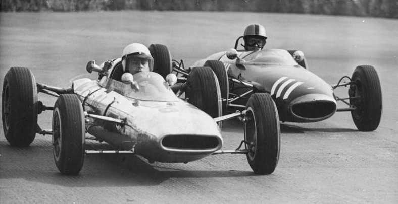 Zentralbild Gahlbeck 19.4.1964 Studre Internationales Auto- und Motorradrennen auf der Halle-Saale-Schleife am 19.4.1964 mit Fahrern aus 17 Ländern. Am 18.4. wurden noch eifrig Trainingsrunden auf dem Kurs absolviert. UBz. Trainingsrunden der Formel 3, Rennwagen bis 1000 ccm der Klasse 1. Links Heinz Melkus auf Melkus-Wartburg, daneben der Franzose Janques Clements auf Lola.